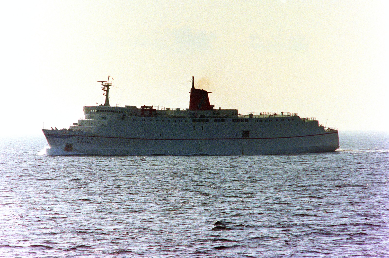 大阪湾内を東神戸へ向け航行中の日本カーフェリー・みやさき